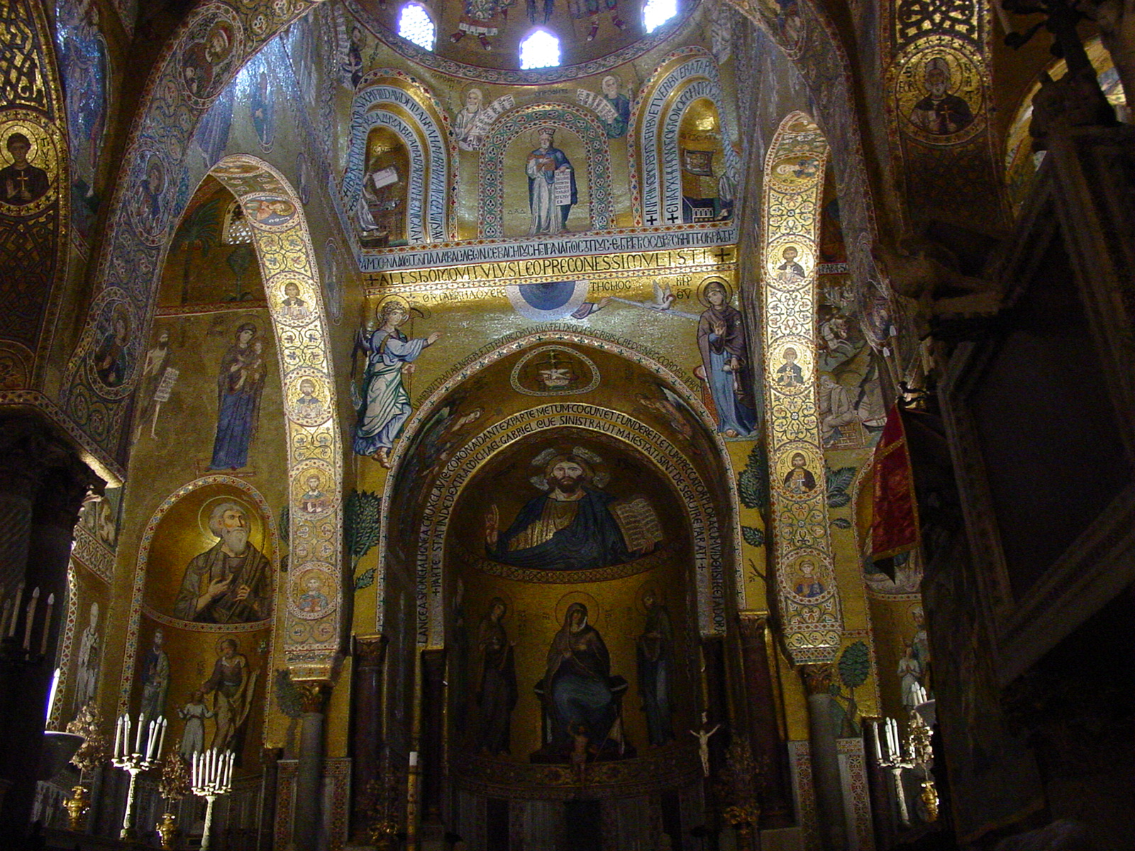 Palermo - Capela palatina - mosaicos bizantinos